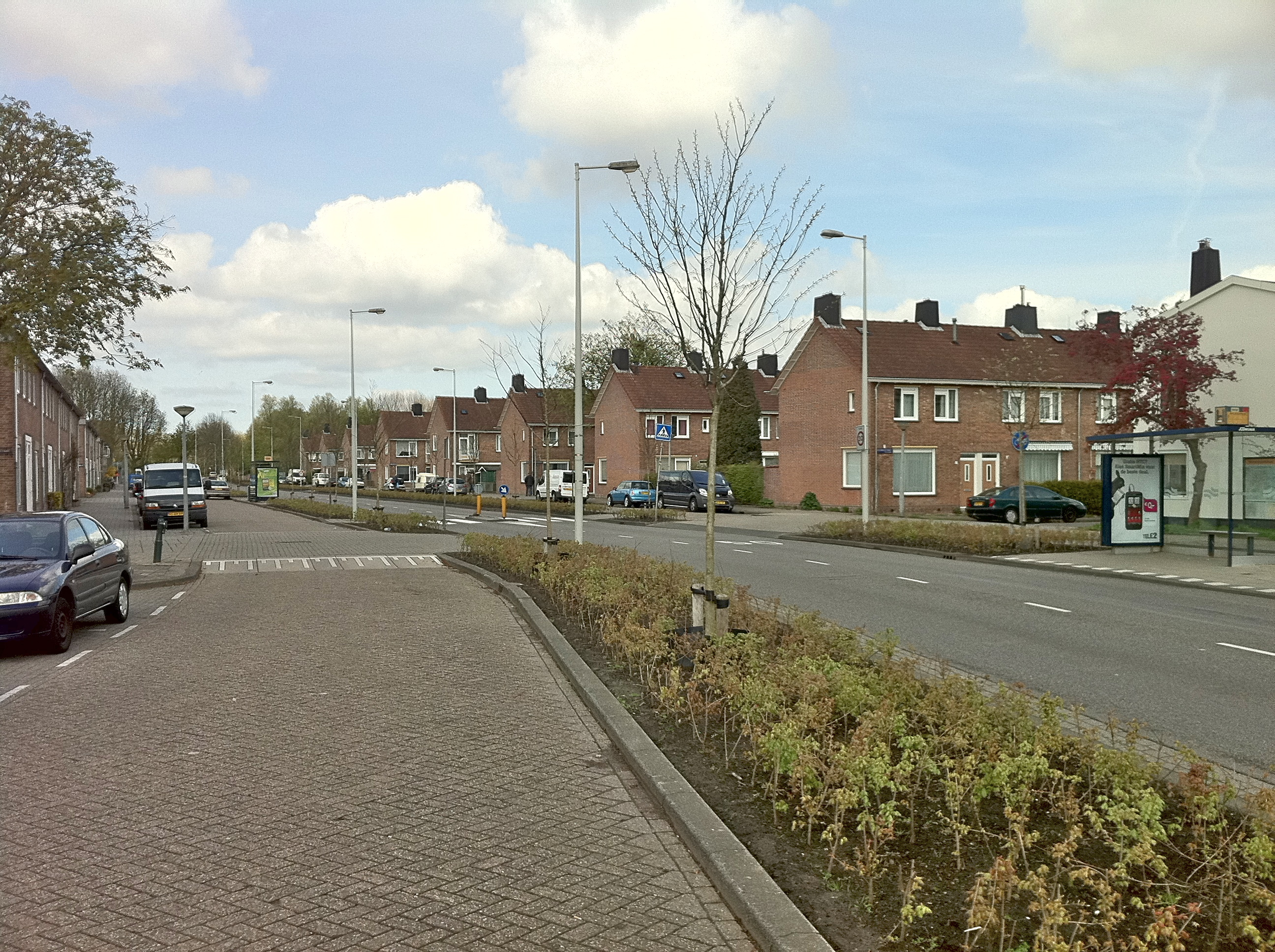 Amsterdam-Noord. Uitbreiding Nieuwendam jaren 50